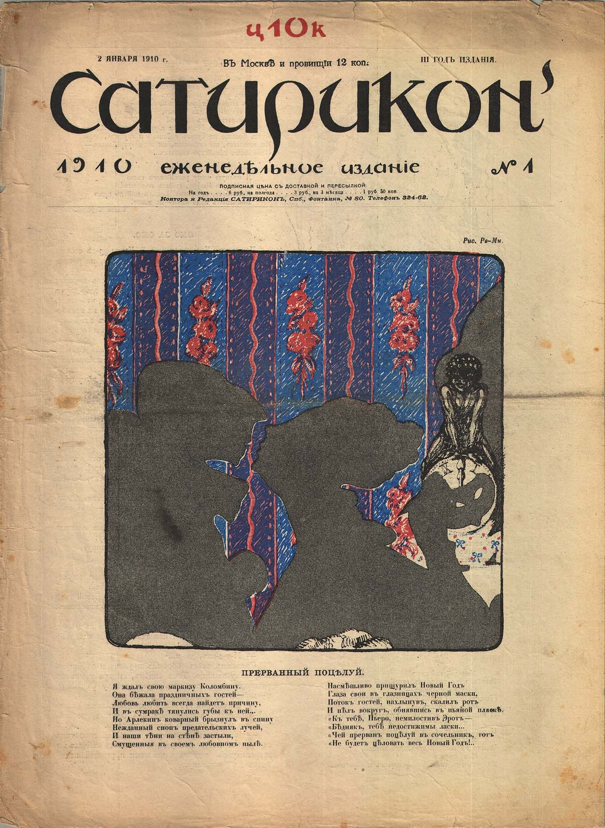 Журнал "Сатирикон" № 1 за 1910.